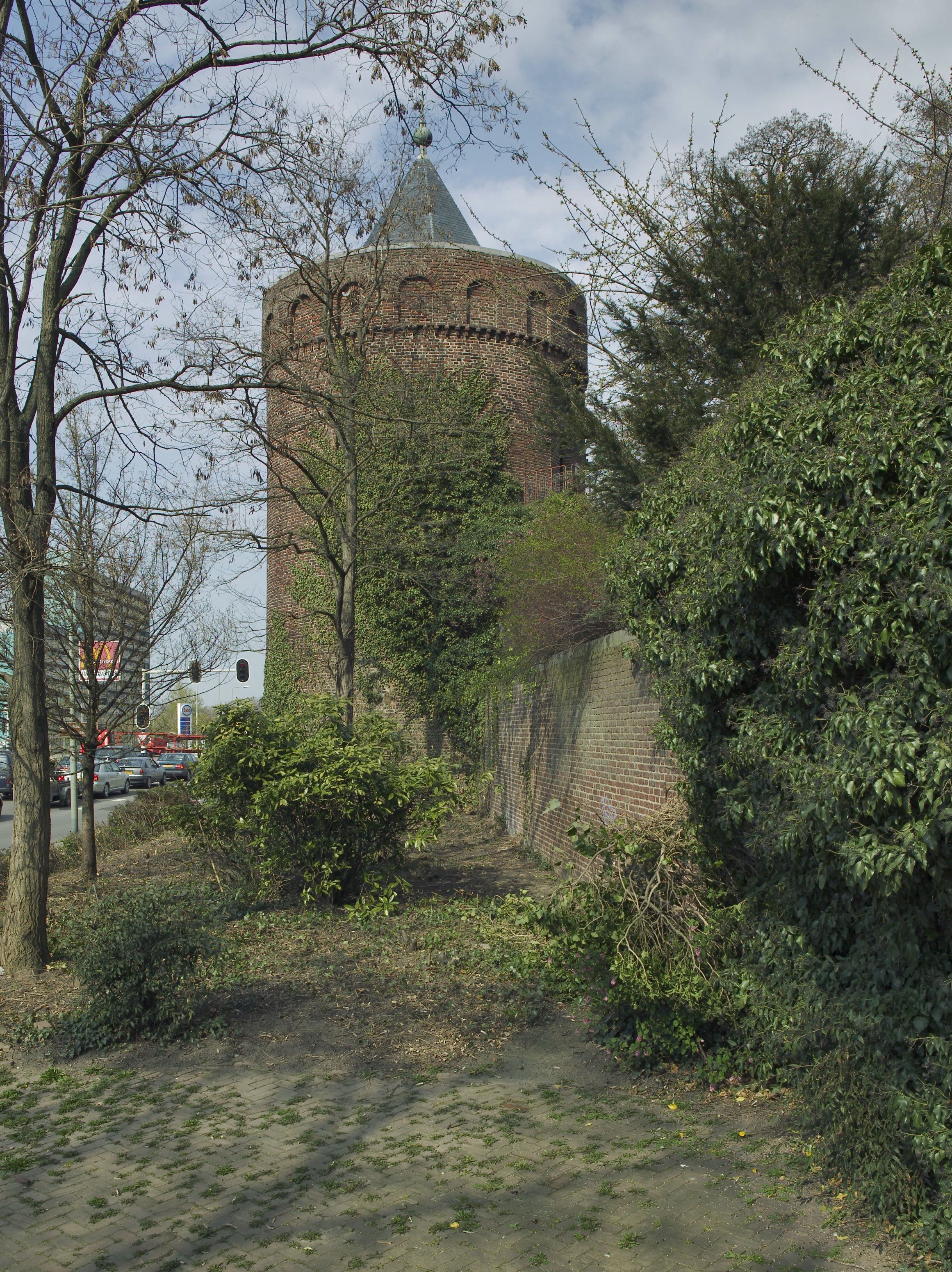 Vestingwerken: Rattentoren vanaf bakstenen trap